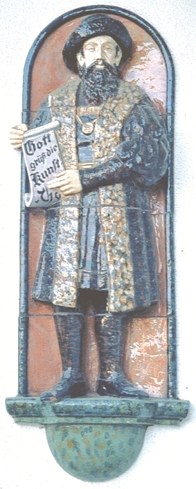 Relief von Kurt Feuerriegel an der ehemaligen Buchdruckerei in Frohburg